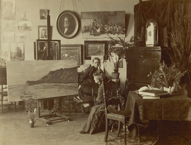 Marie Luplau and Emilie Mundt in their Frederikberg home